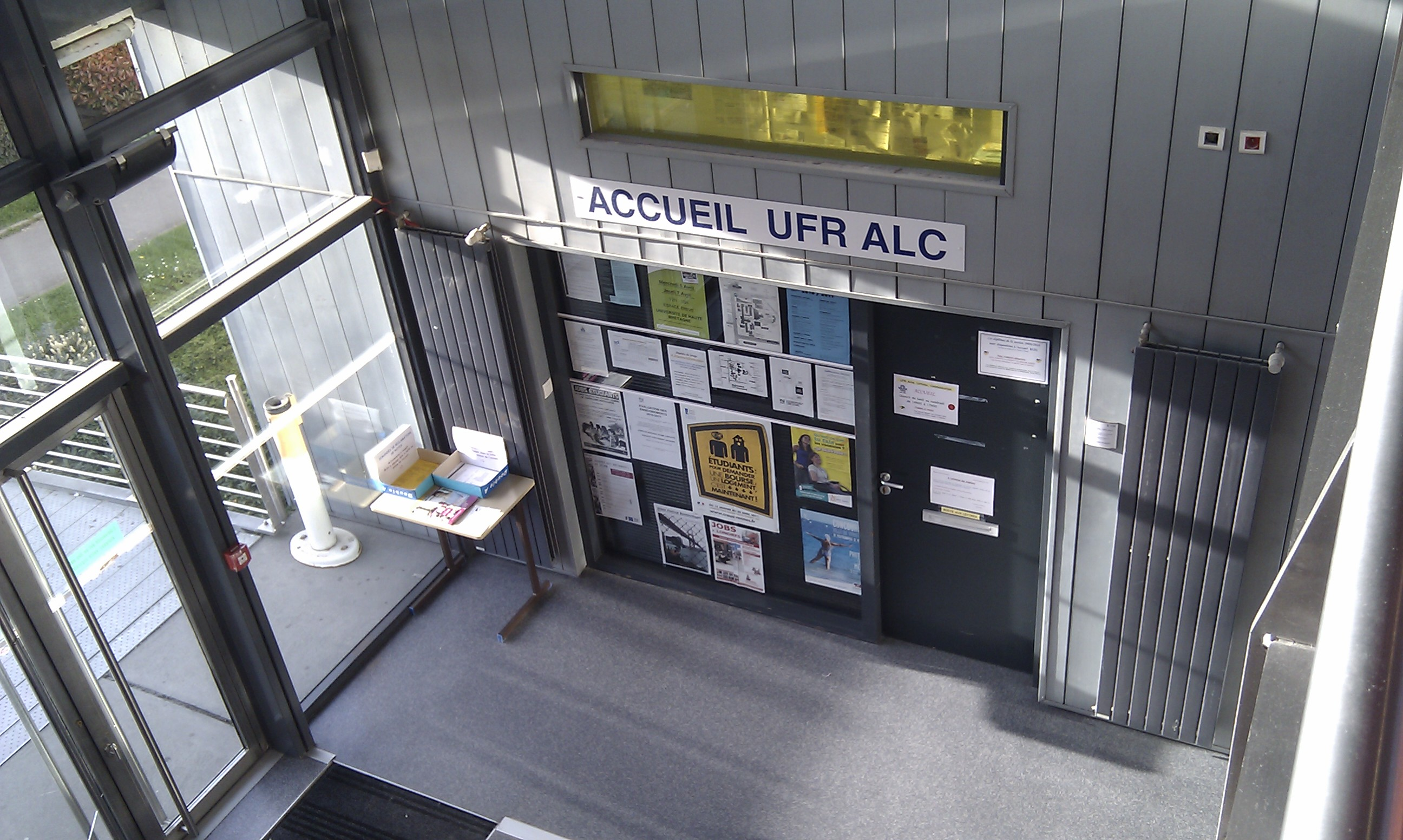 Accueil de l'UFR ALC, Campus de Villejean, Rennes.